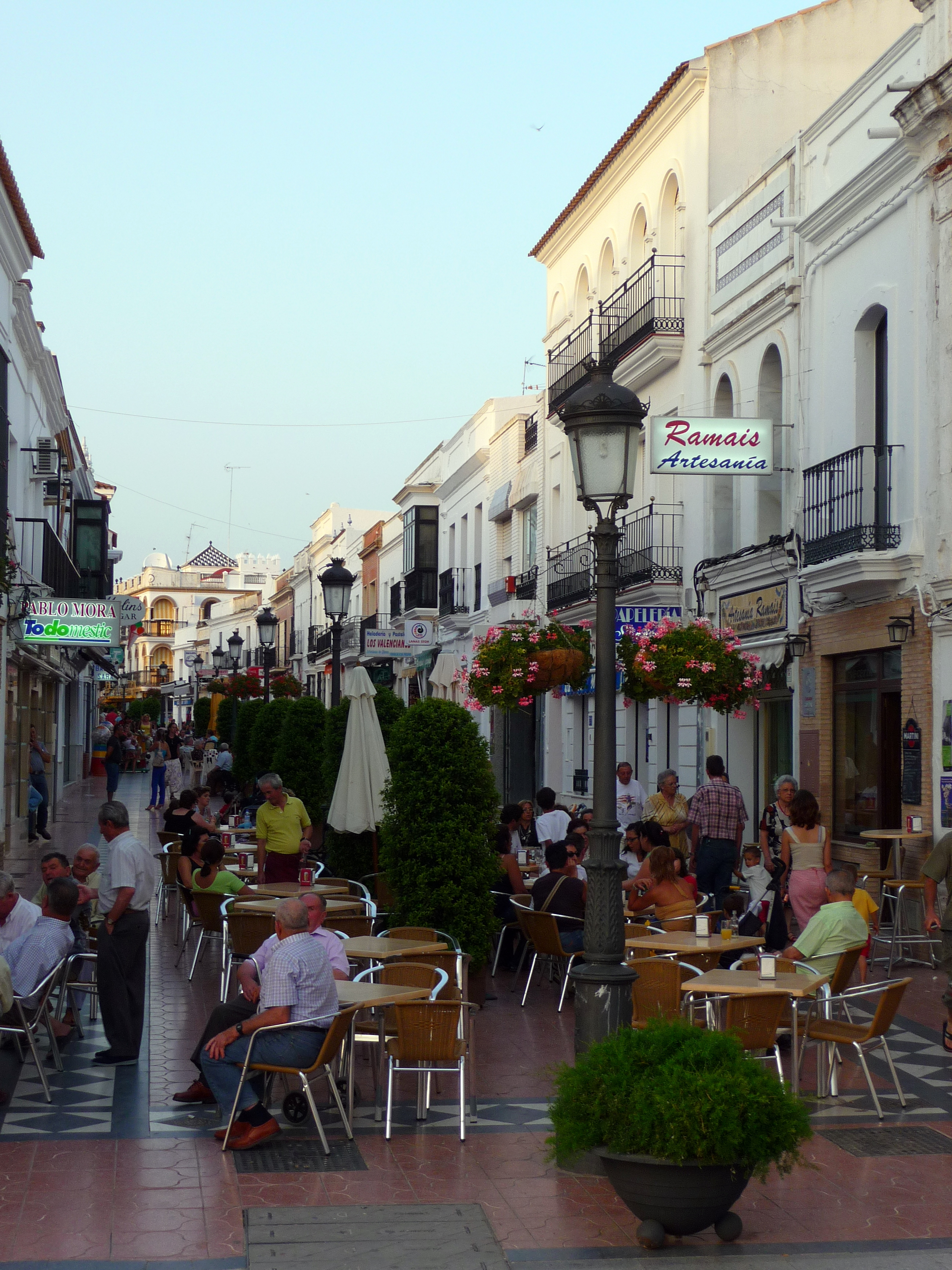 Plaza Larga. Cartaya, provincia de Huelva (España)